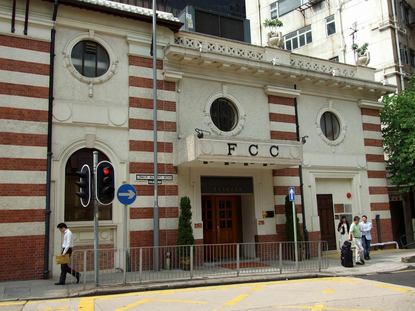 舊牛奶公司倉庫北座(香港外國記者會)